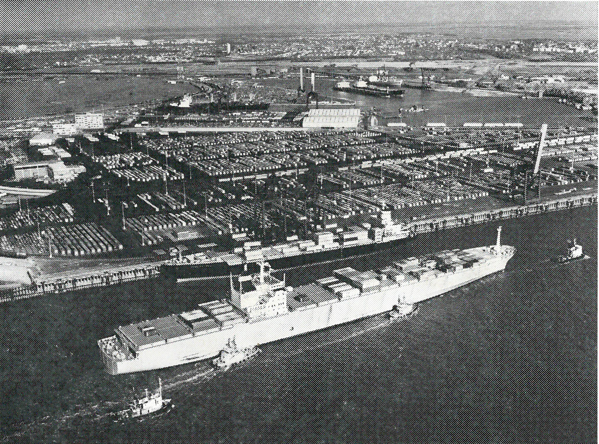 Luftbild Containerterminal Bremerhaven